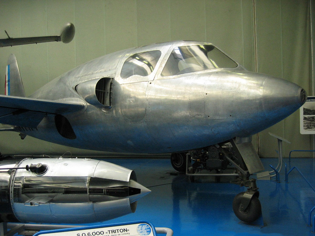 SNCASO SO-6000 Triton - Musee de l'Air et de l'Espace - Bourget - France